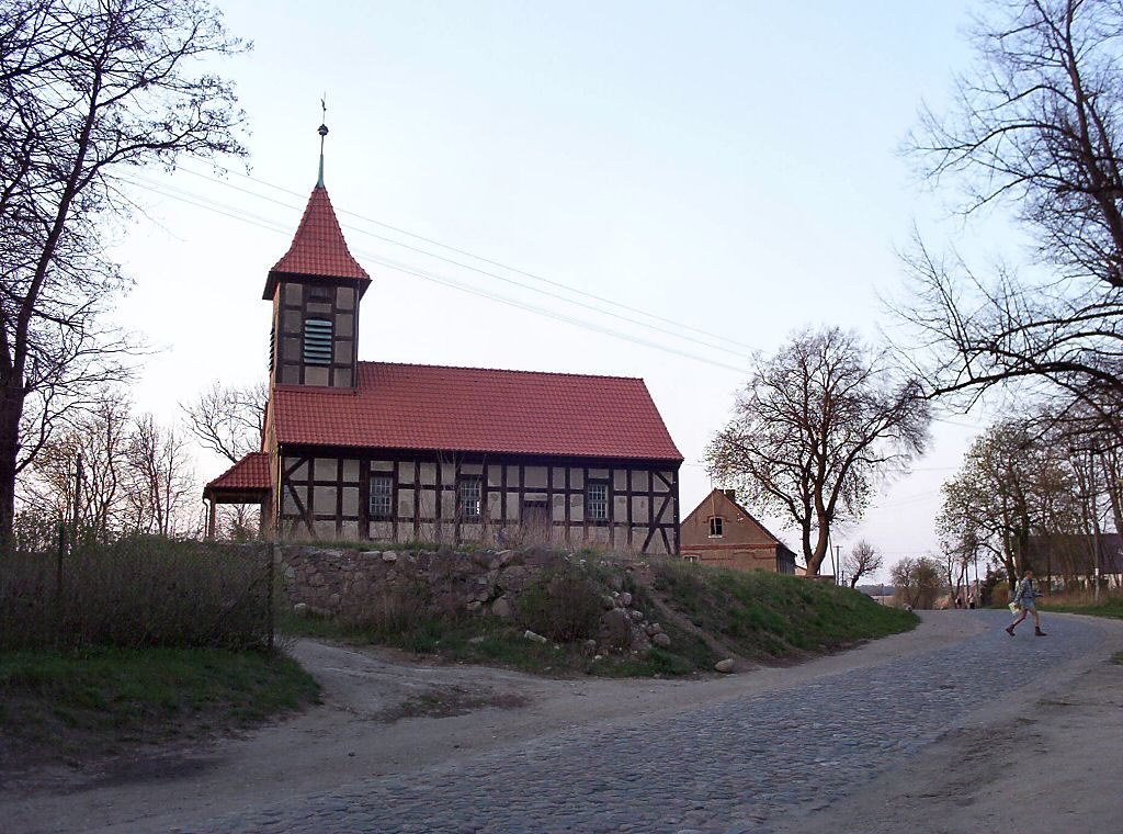 Chłopowo (powiat myśliborski) - kościół